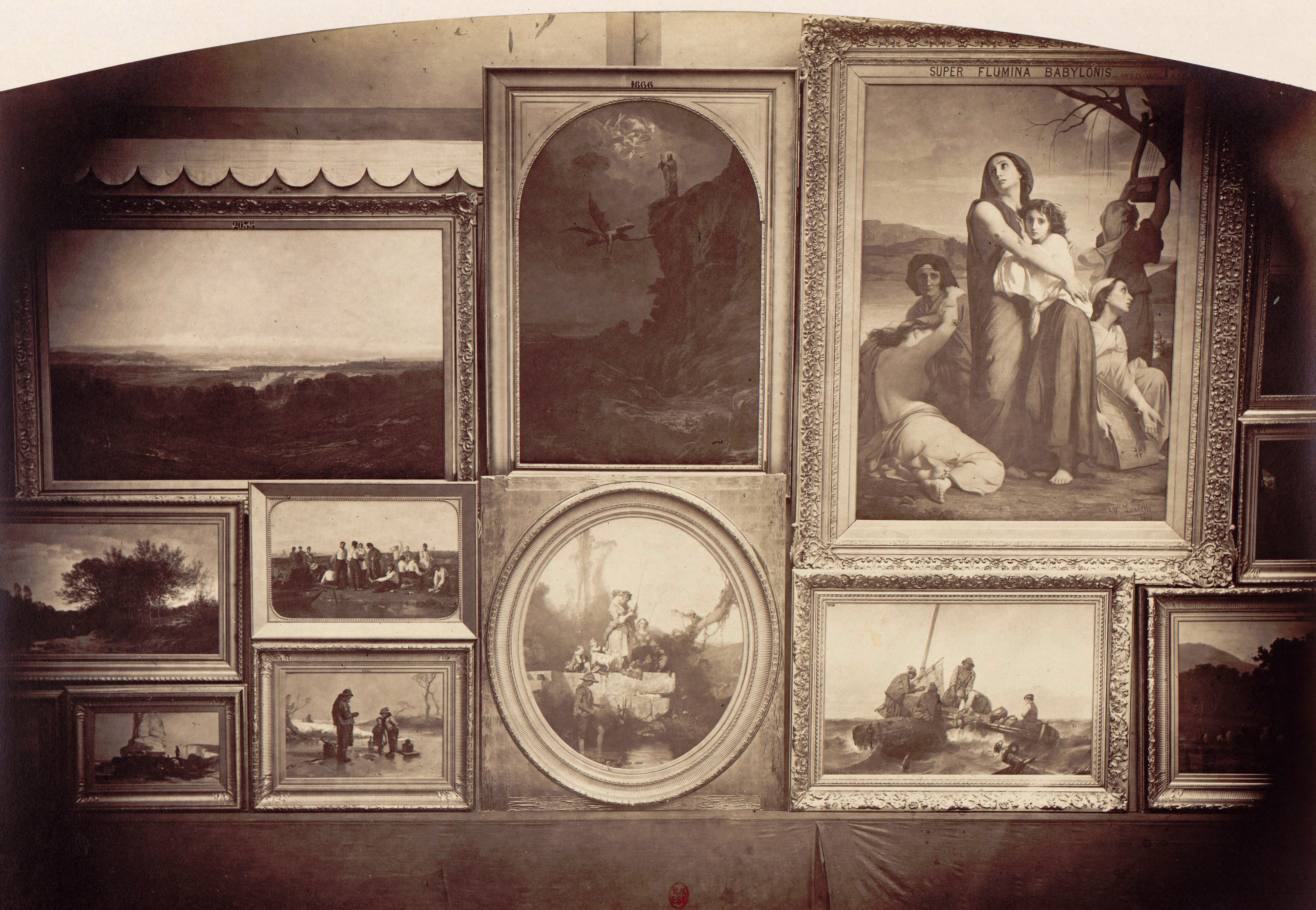 Hall des sculptures et cimaises du salon de 1861 (Palais de l'industrie), photographie de Pierre-Ambroise Richebourg, largeur du cliché : environ 27 cm. Vue n°42, extraite d'un album de 42 vues. BnF inv : FOL-AD-1104